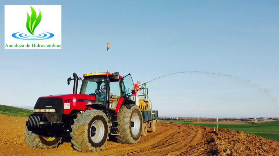 Hidrosiembra para restauración ambiental tras movimiento de tierra en obra